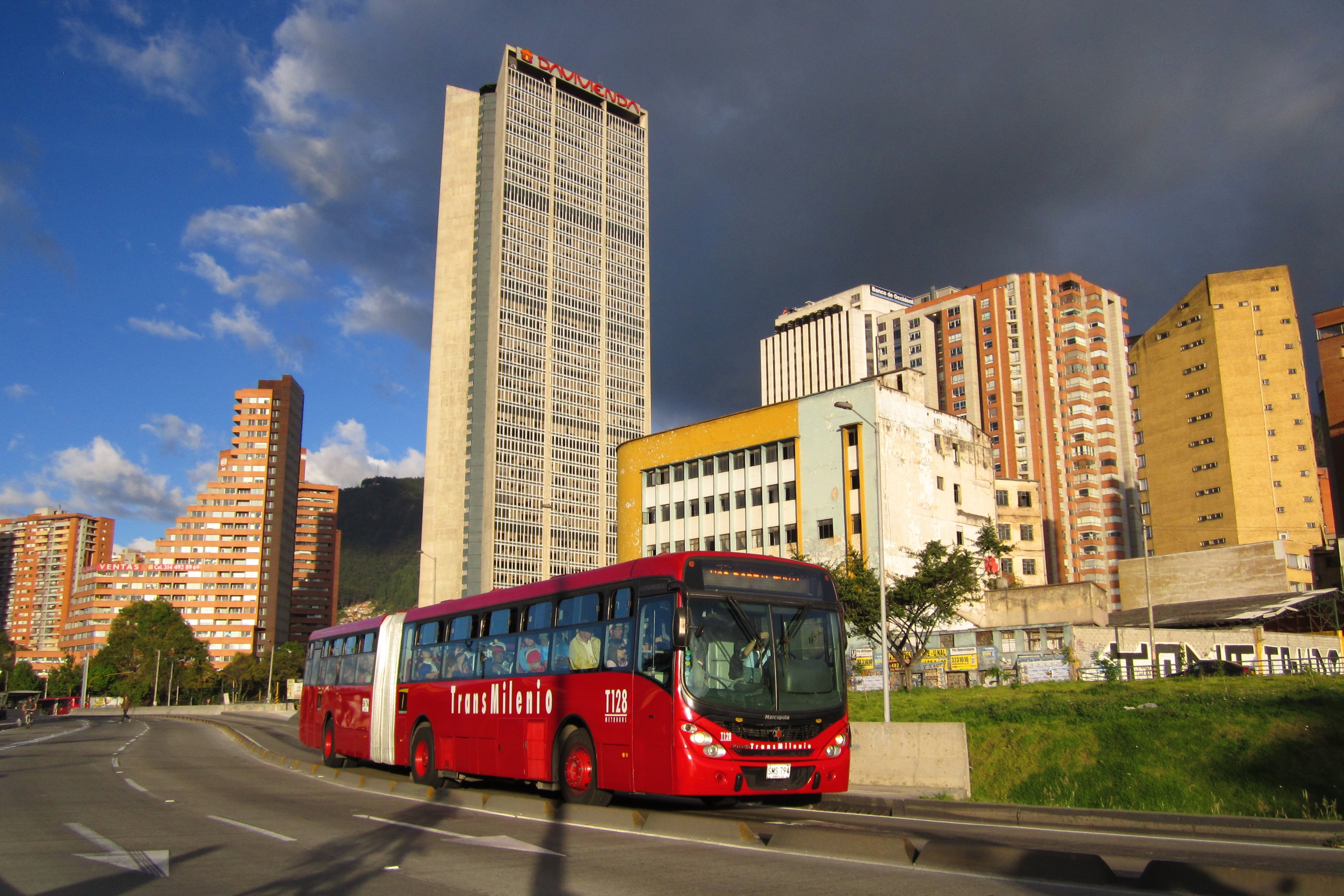 Bus de Transmilenio en la avenida Caracas con calle 26. Al fondo la torre de las Américas en el Centro de Comercio Internacional.